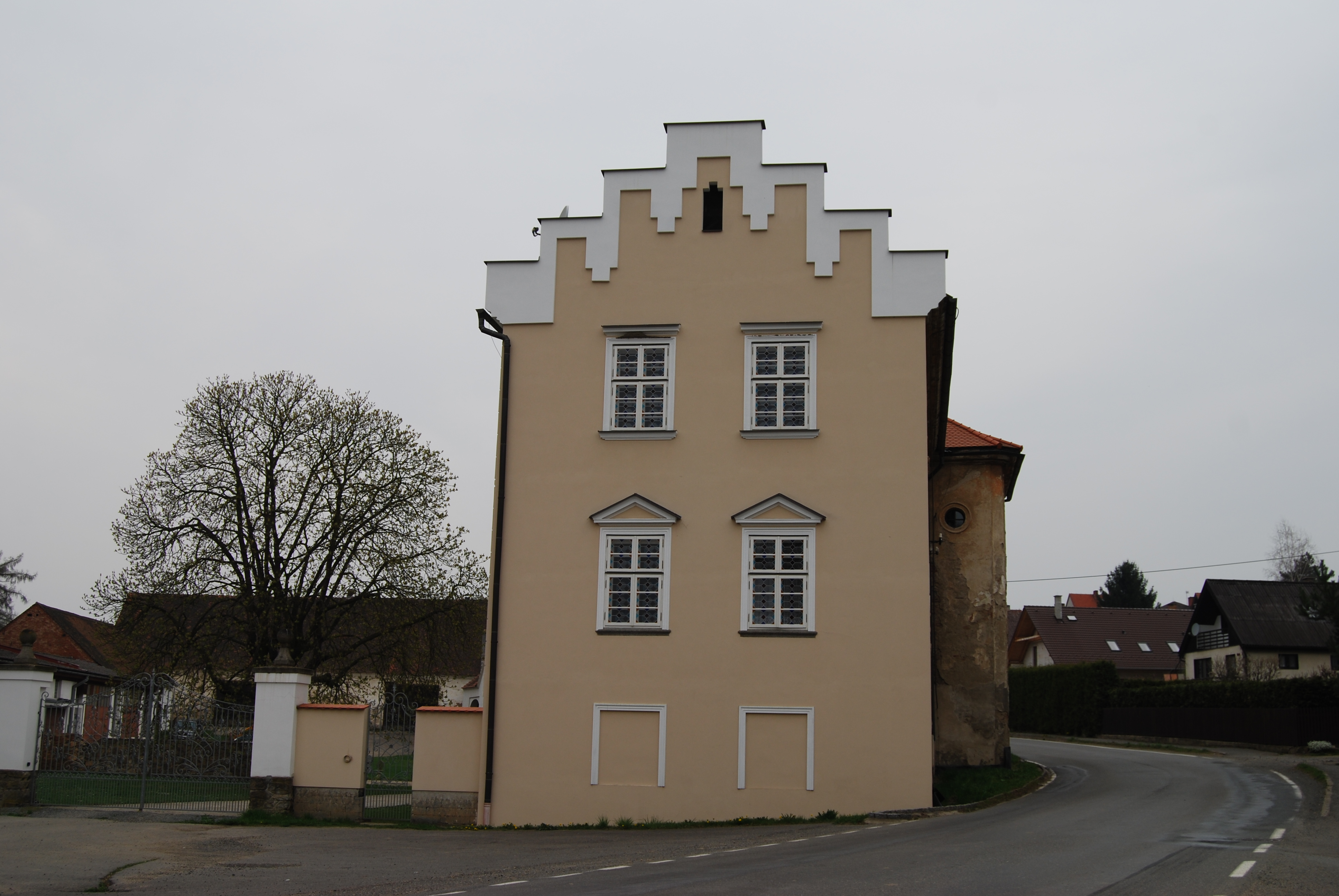 Zámek. Kňovice se nachází v okrese Příbram, kraj Středočeský, Česká republika.